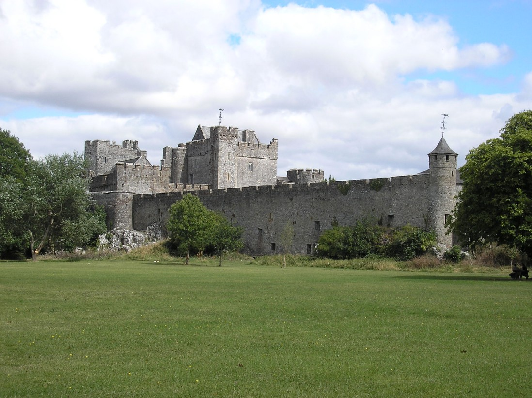 taken by Valdoria august 2006